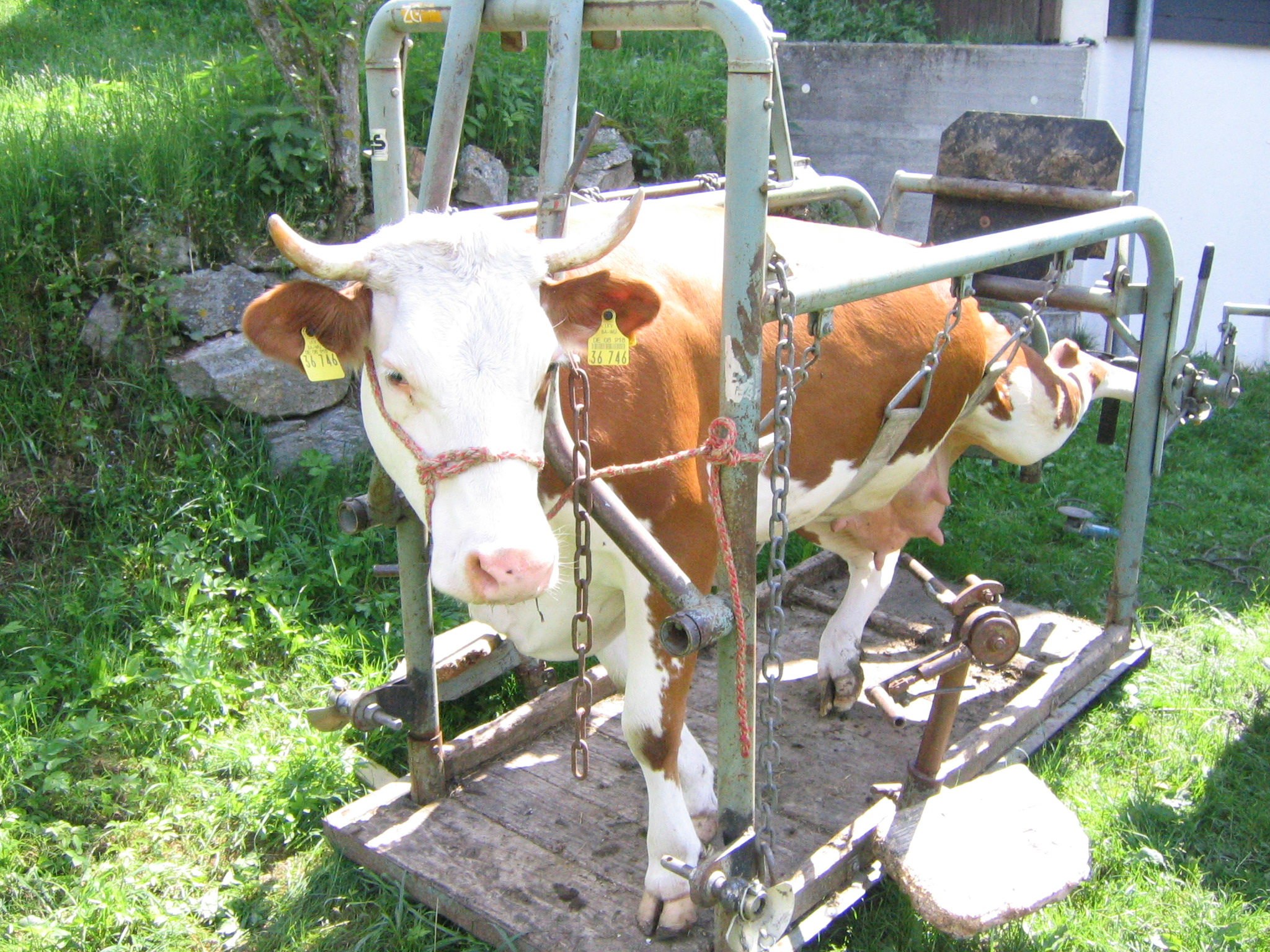 Klauenpflege beim Hausrind